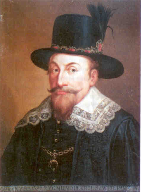 Portret Zygmunta III Wazy